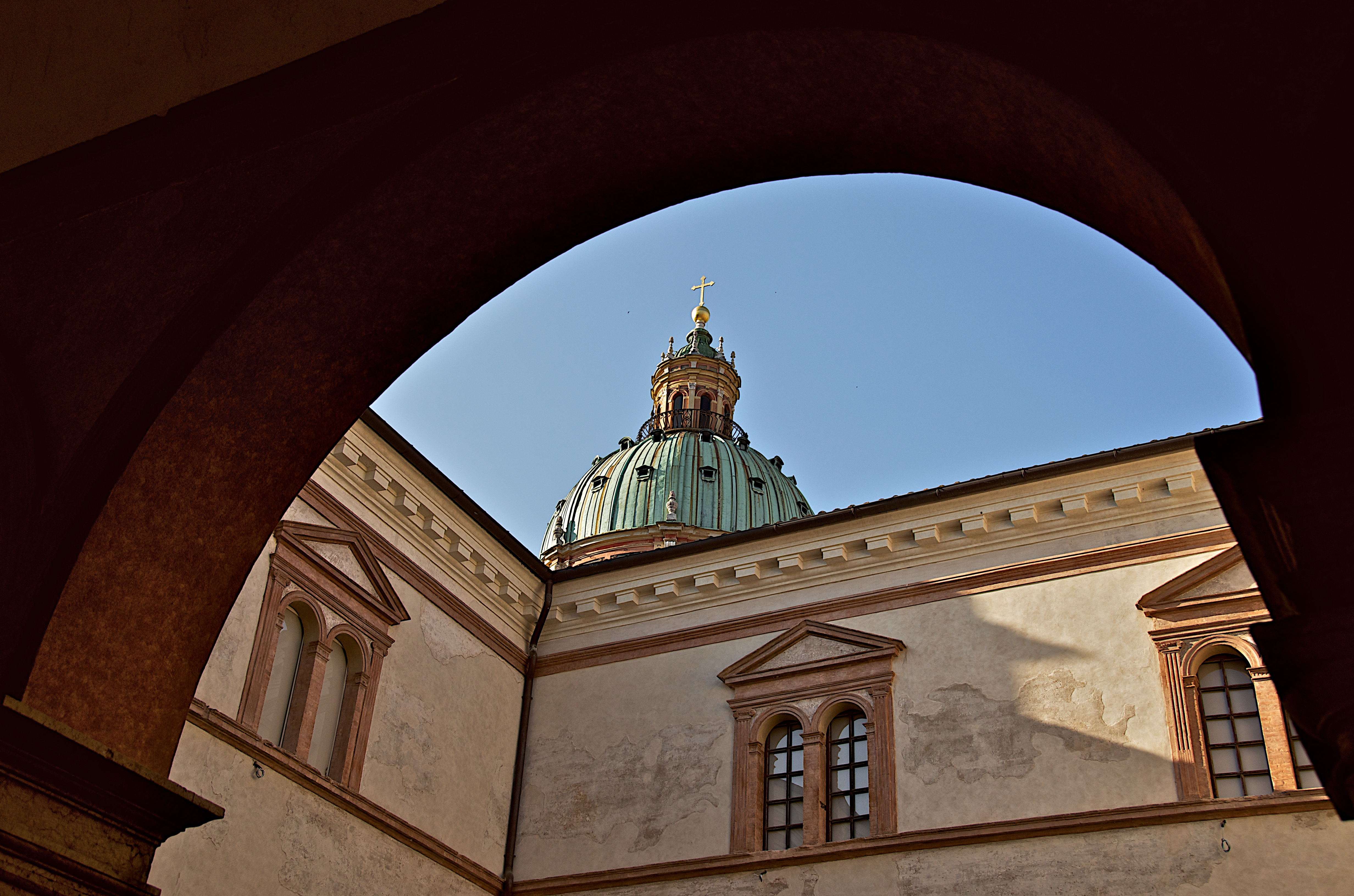 Chiesa di San Pietro (Reggio Emilia) This is a photo of a monument which is part of cultural heritage of Italy.